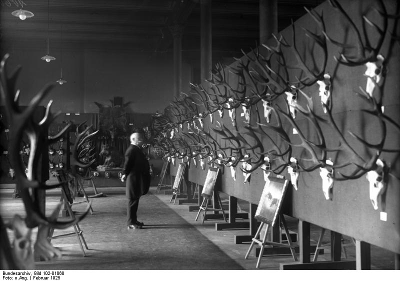 Berlin. Die Eröffnung der dritten deutschen Jagdausstellung fand unter Beisein städtischer Würdenträger in dem Museum für Naturkunde in der Invalidenstr. in Berlin statt. Blick in den Trophäen Saal, dem Hauptschmuckstück der Jagd-Ausstellung.